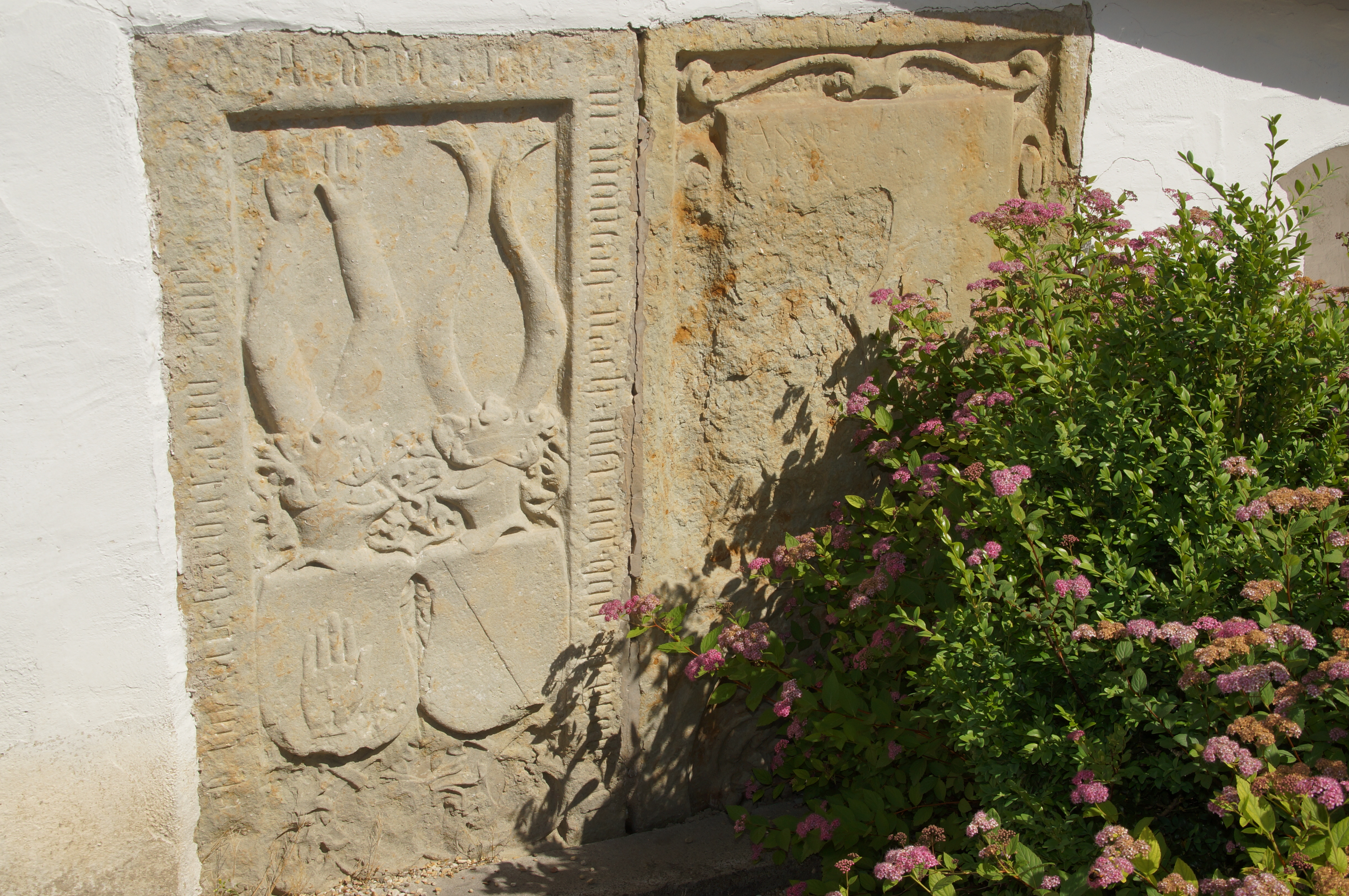 Katholische Pfarrkirche St. Nikolaus Friedhofsmauer mit Reliefs und Grabsteinen, 15.-17. Jahrhundert This is a photograph of an architectural monument.